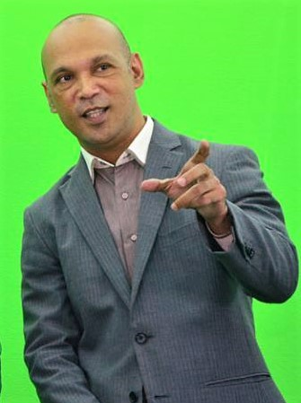 Nélio Isaac Sarmento in einer Greenbox bei TVETL